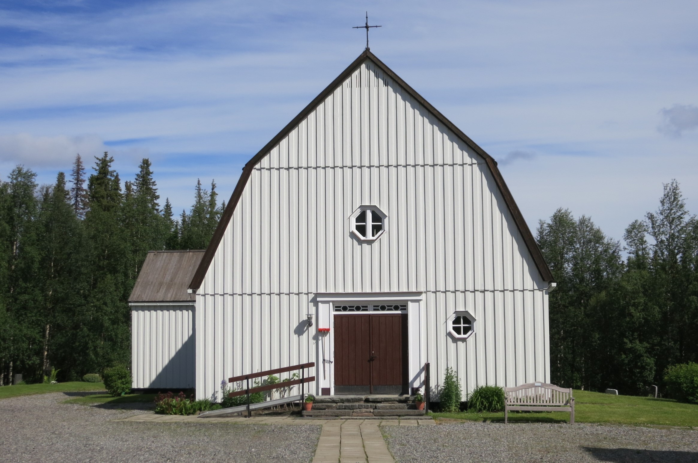 Saxnäs kyrka i Lappland